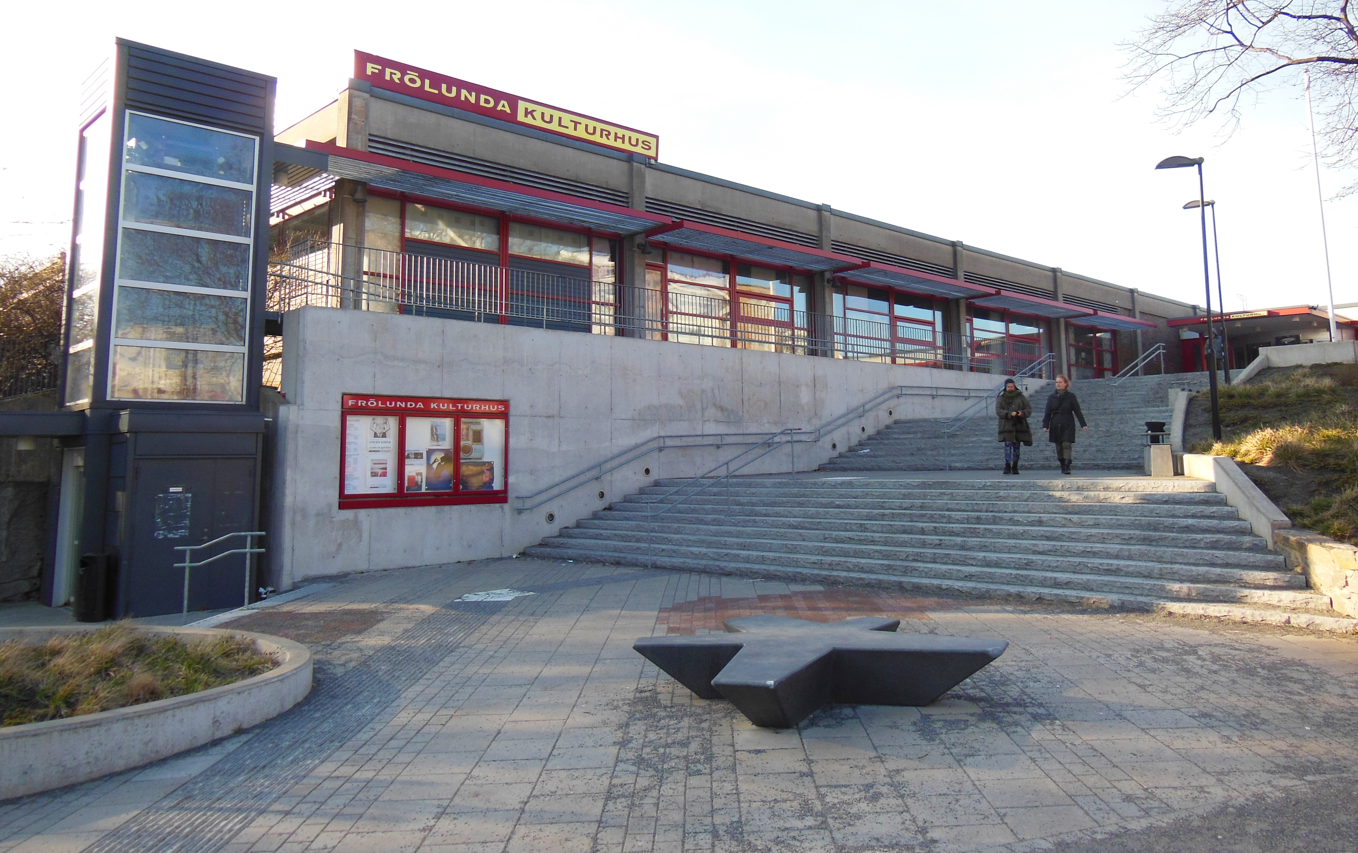 Frölunda kulturhus i mars 2014.